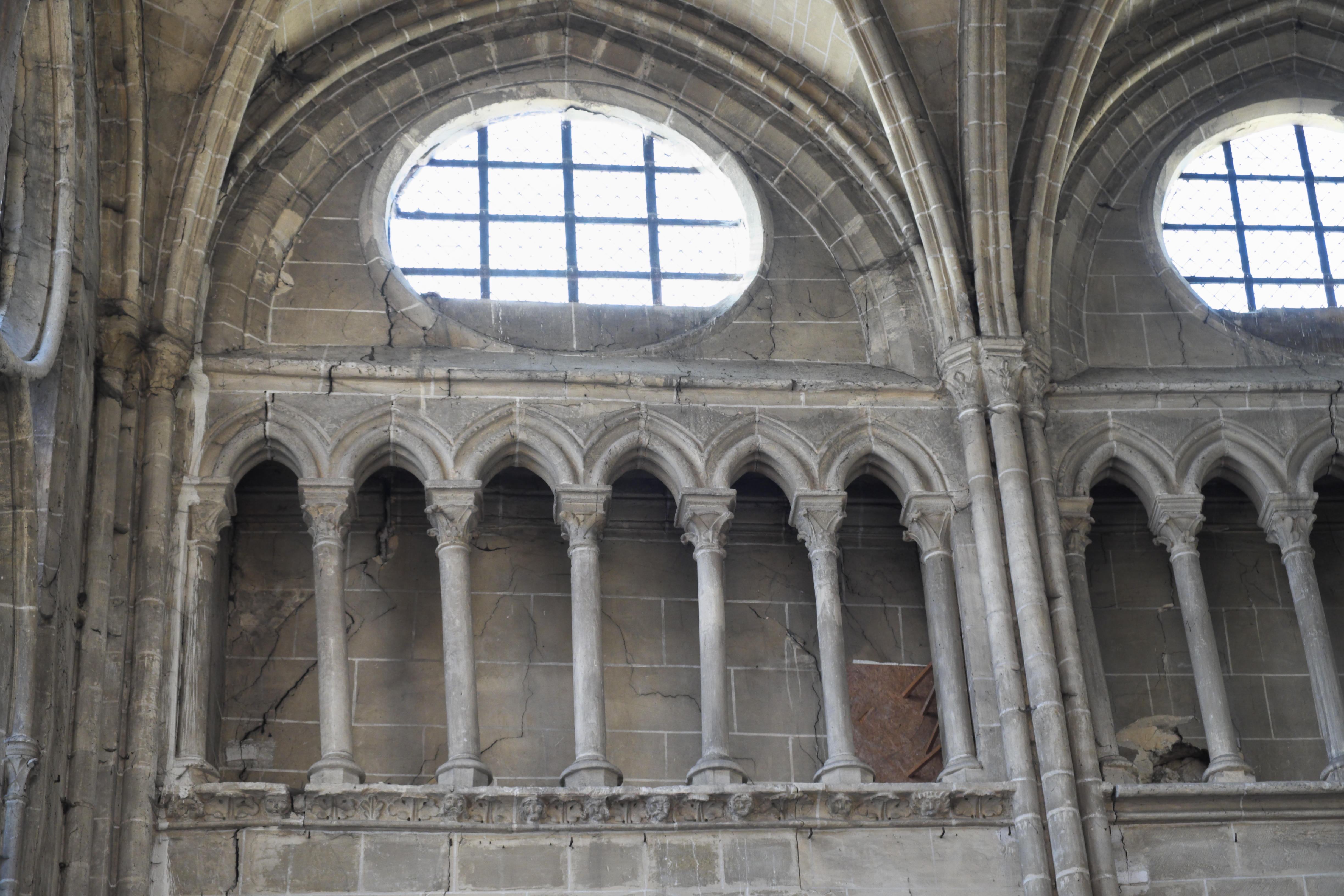 Katholische Pfarrkirche Saint-Germain in Andrésy im Département Yvelines (Île-de-France/Frankreich), Triforium